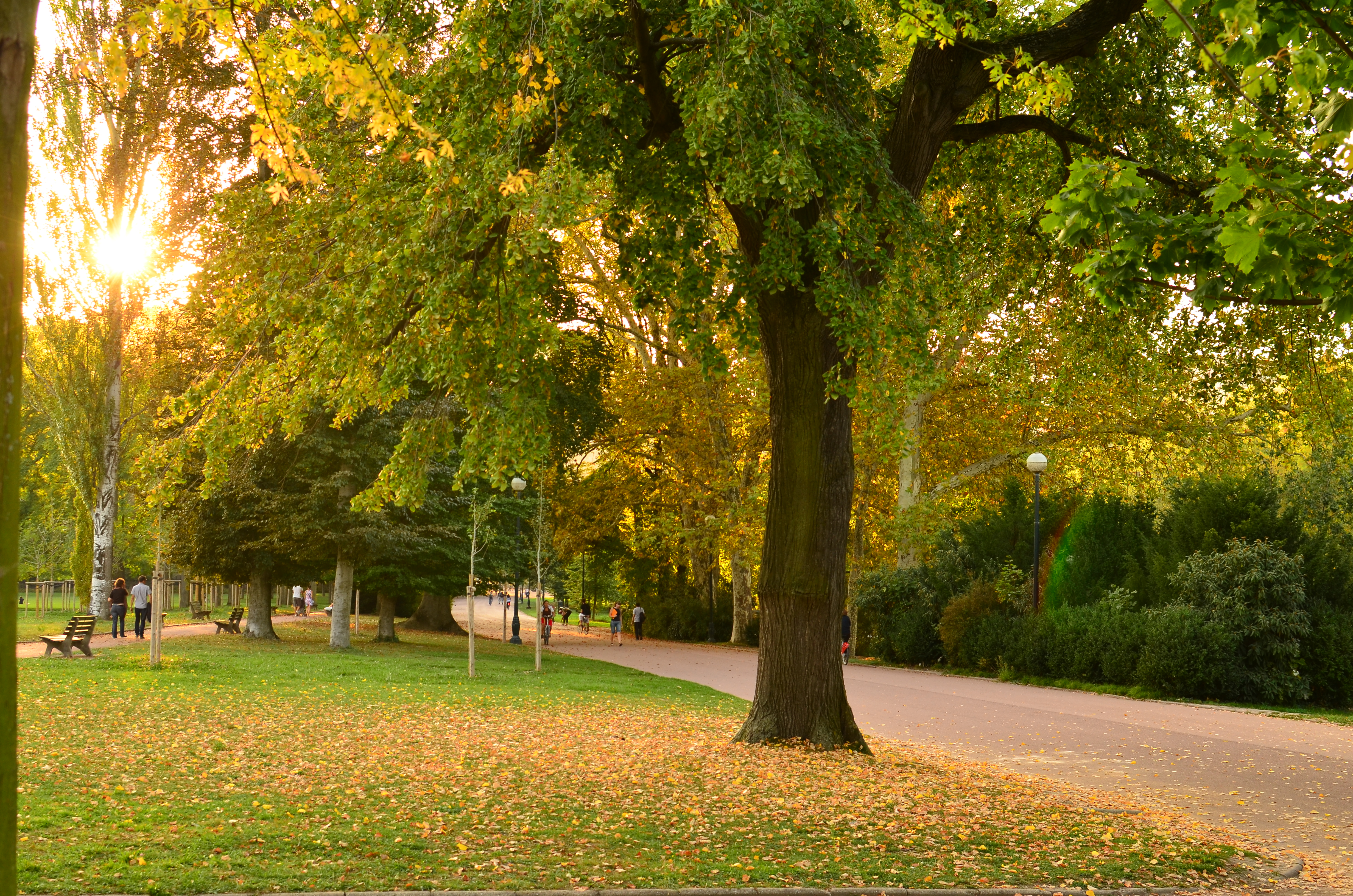 Parc de la Tête d'Or de Lyon - Allée du Grand Camp